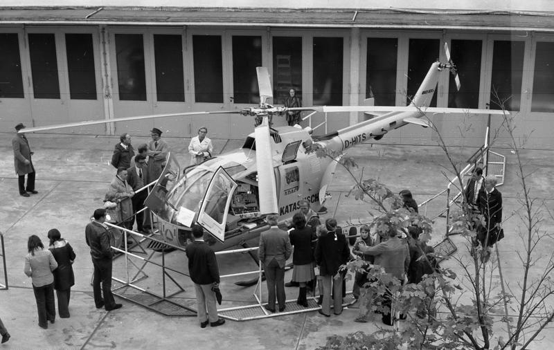 Zivilschutz, Tag der offenen Tür, MBB Bo 105 1974 28.9. BZS Tag der off. Tür [Bonn.- Bundesamt für den Zivilschutz, "Tag der offenen Tür".- Rettungshubschrauber des Katastrophenschutzes Typ Messerschmitt-Bölkow-Blohm Bo-105 mit Kennung D-HITS im Hof stehend]